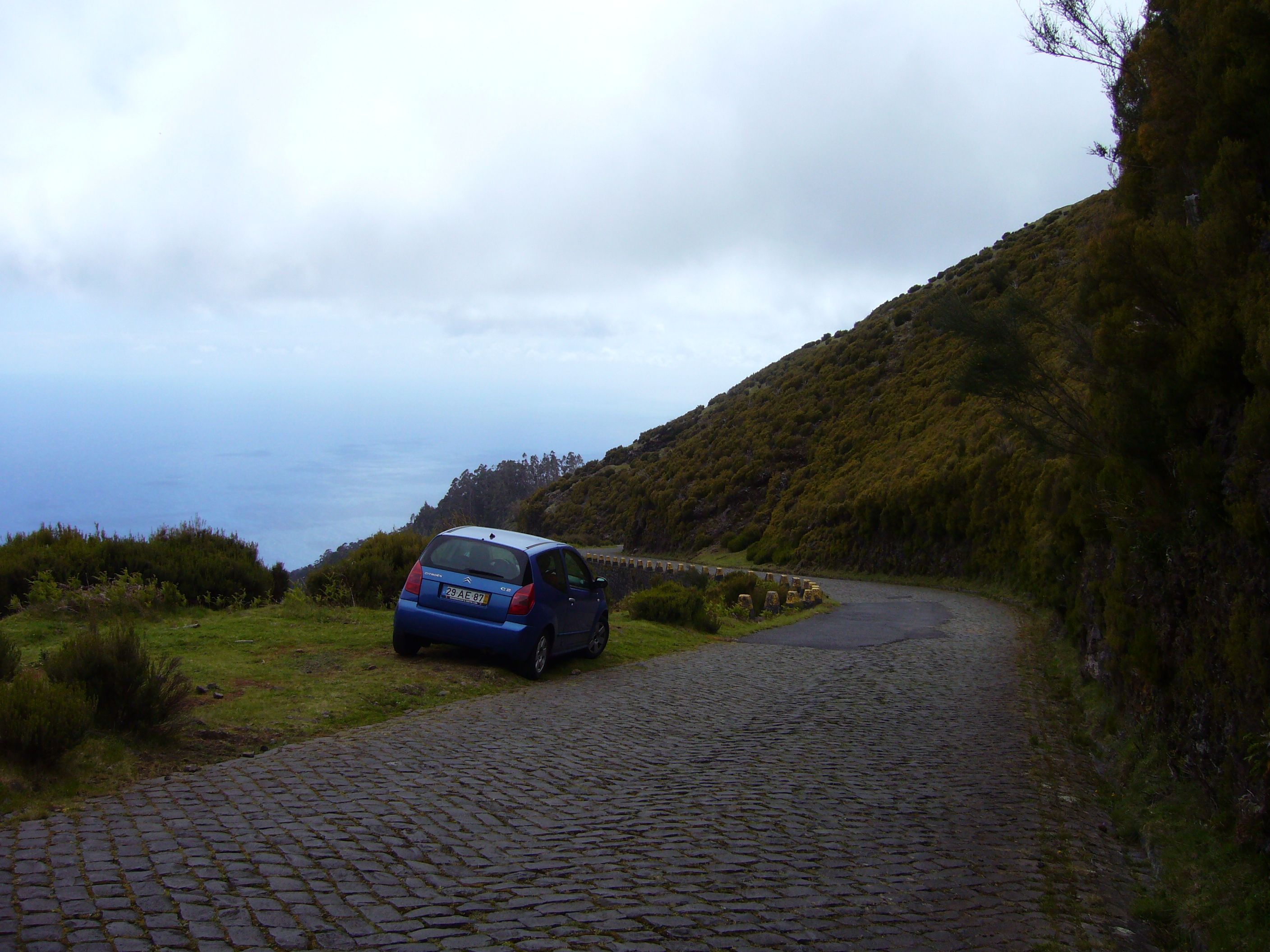 Road from Paúl da Serra near Rabaçal down to Calheta -Madeira